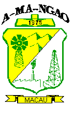 Brasão do município de Macau, Rio Grande do Norte, Brasil.